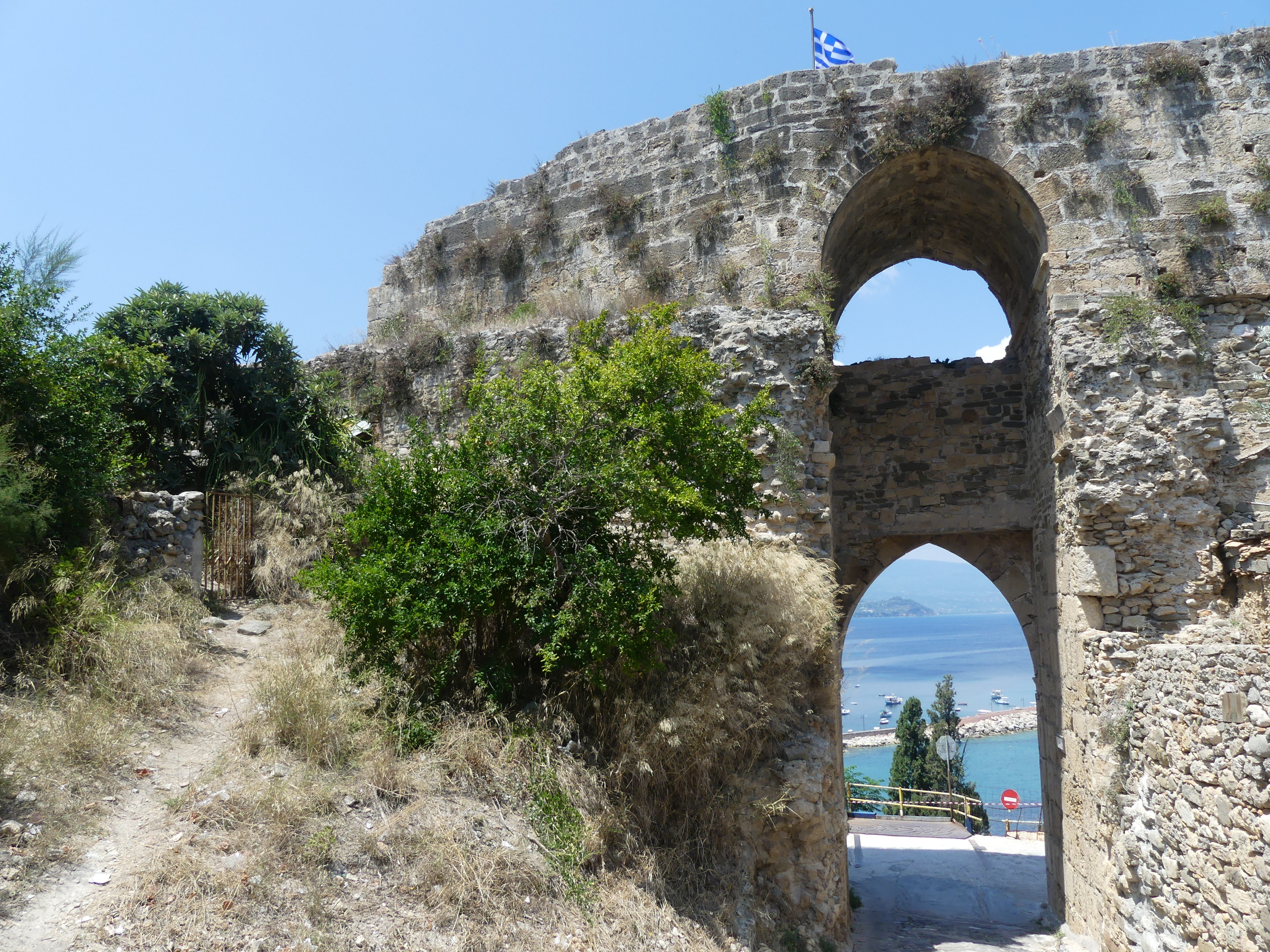 Κάστρο Κορώνης«Κάστρο Κορώνης»